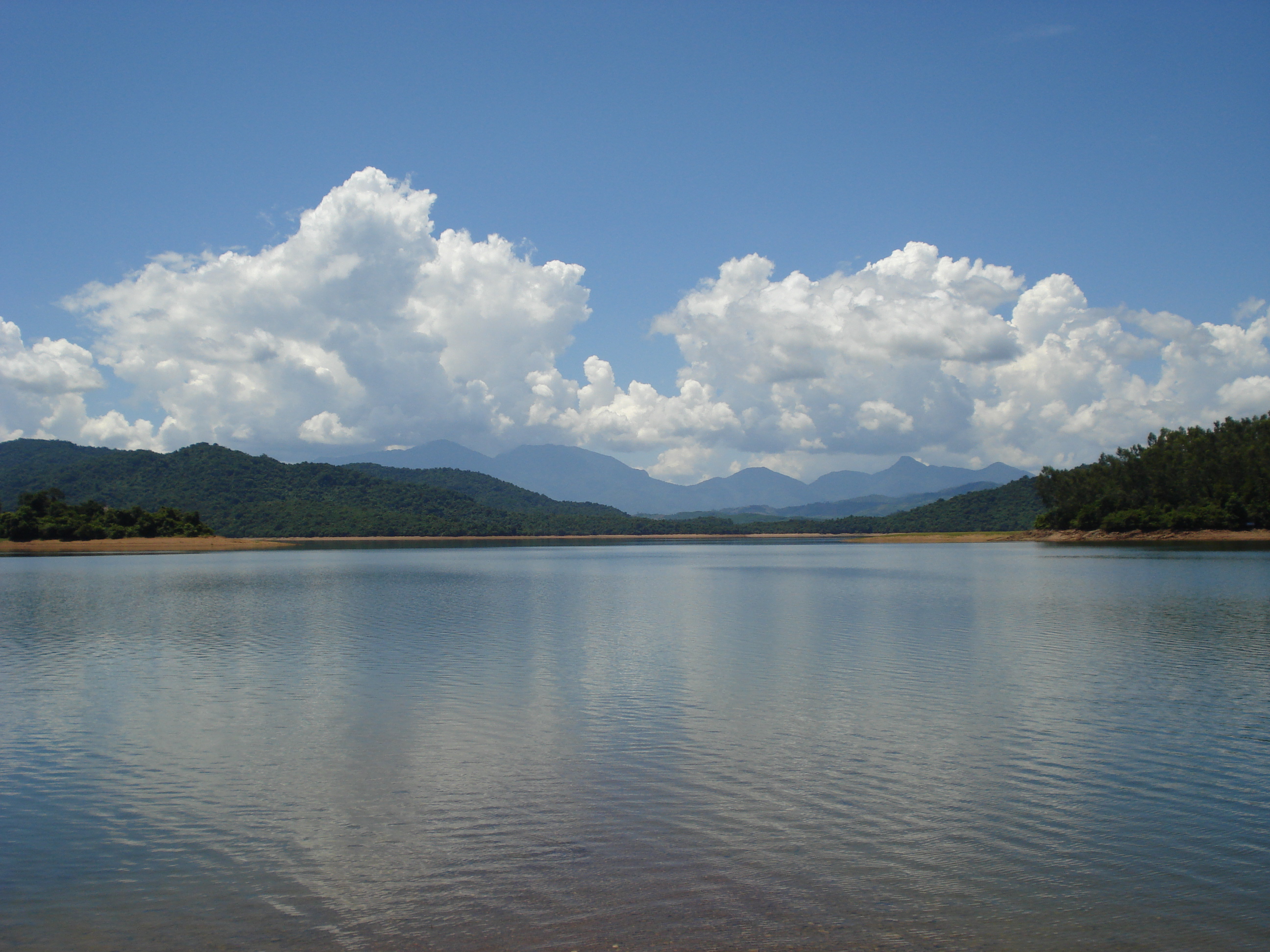 Phuninh Lake